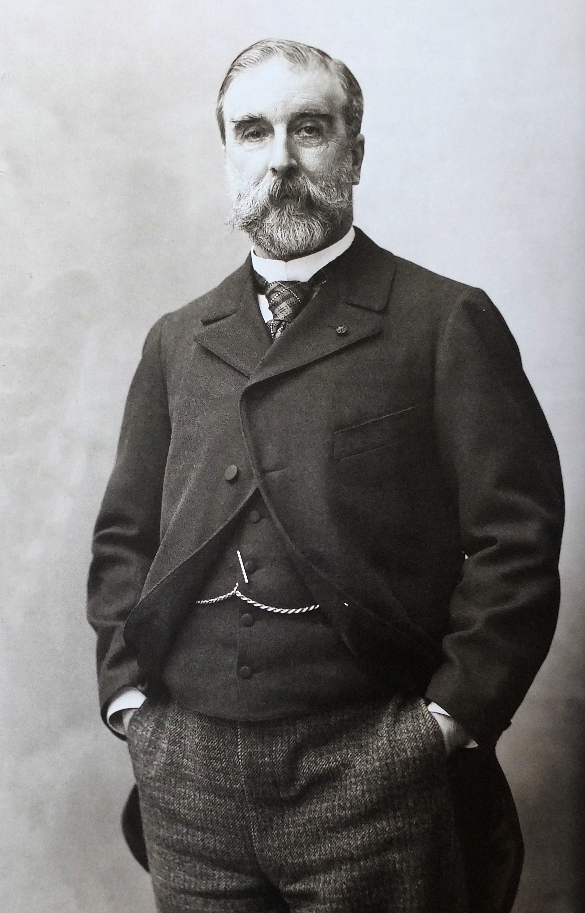 Ludovic Halévy, photographié par Paul Nadar le 25 février 1896.